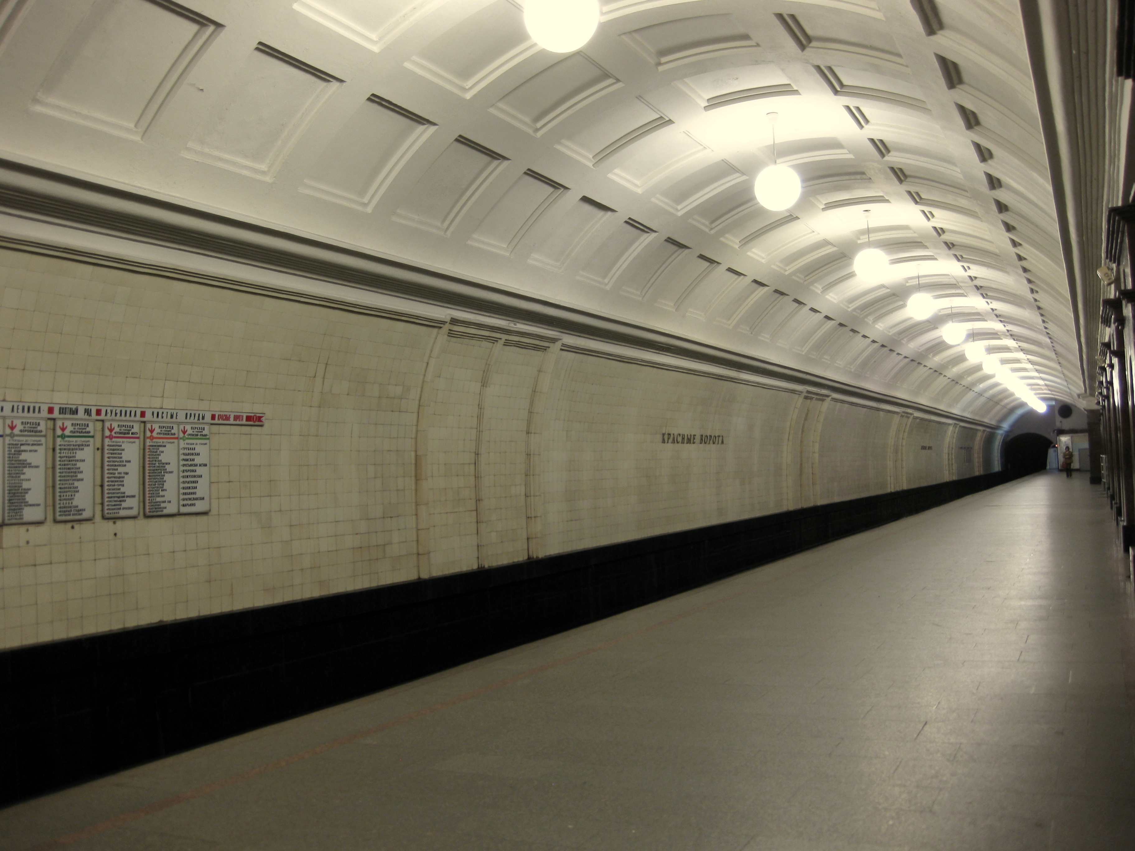 Станция «Красные ворота» Сокольнической линии Московского метрополитена